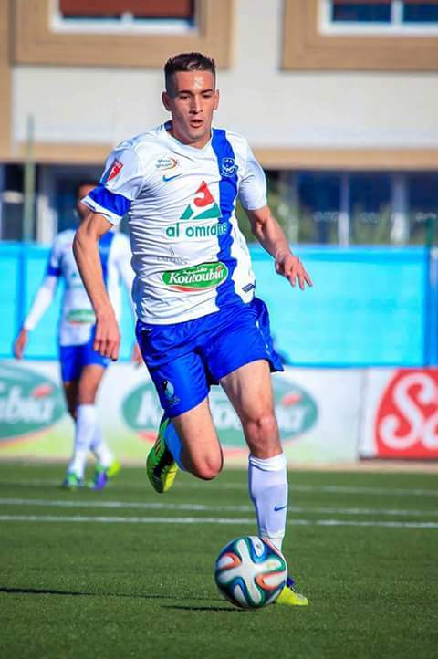 Nabil Amghar jugador del CRA